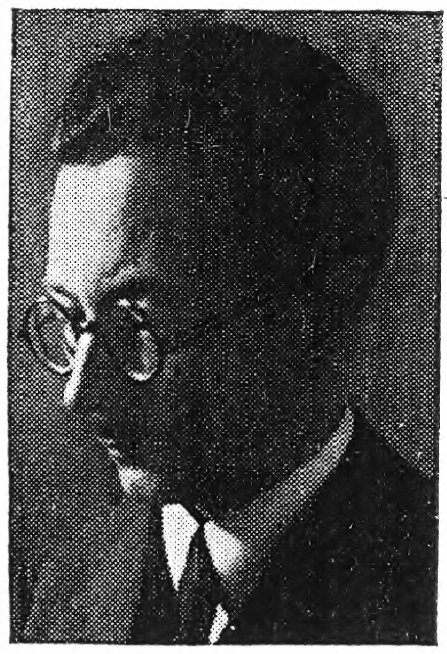 Ludwig Dexheimer Porträt, Spiegelung des Originals